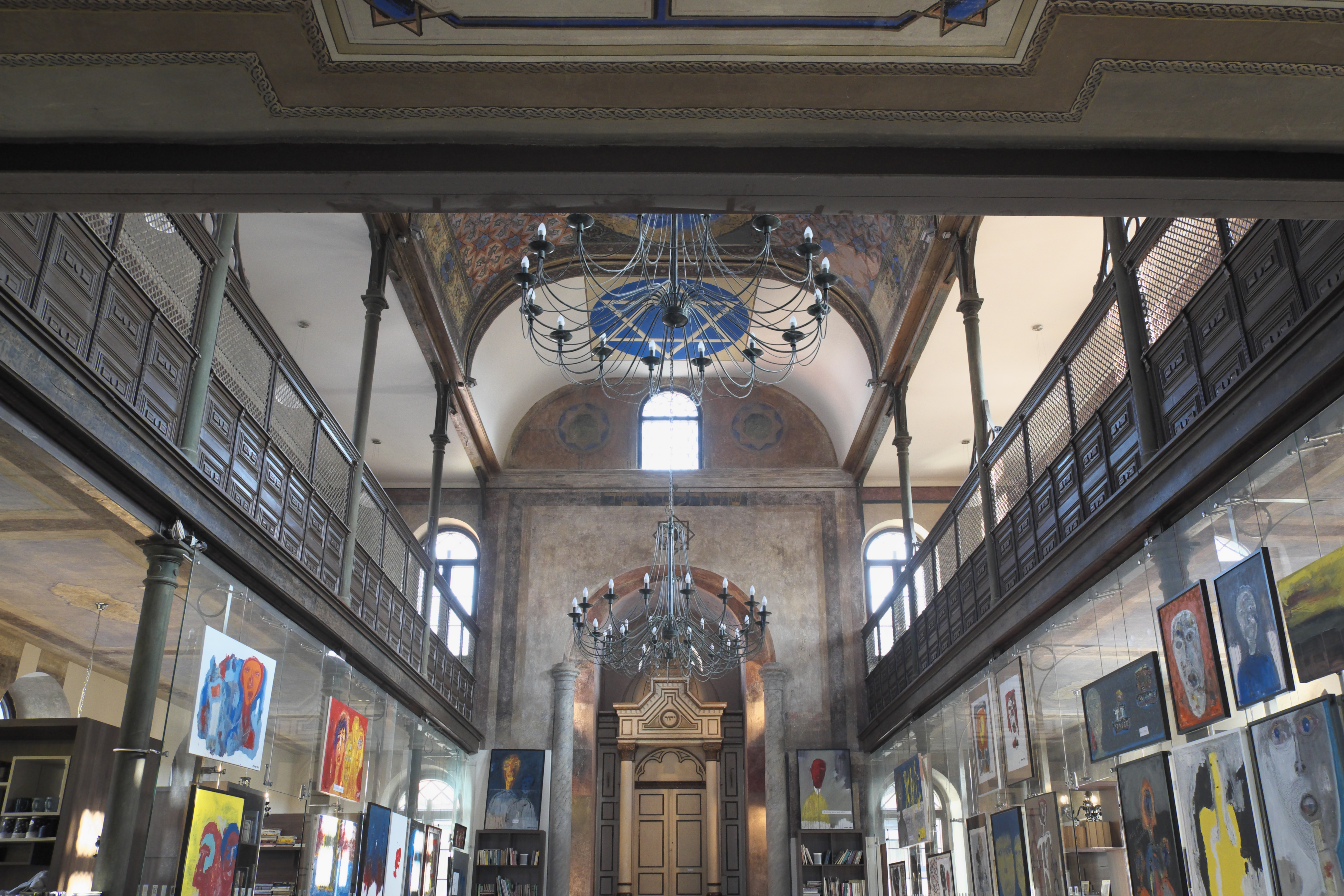 Ehemalige Orthodoxe Synagoge, Haulíkova 2, in Trnava (Slowakei), Innenraum